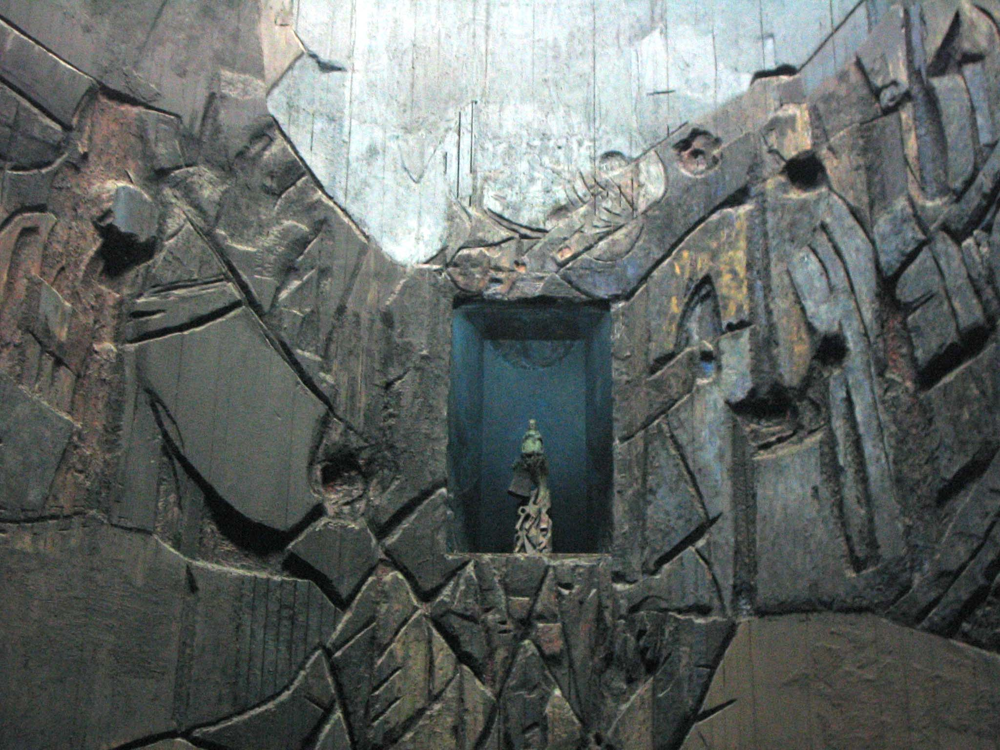 Irudia/Image: Arantzazu santutegia, abside, Oñati, Gipuzkoa